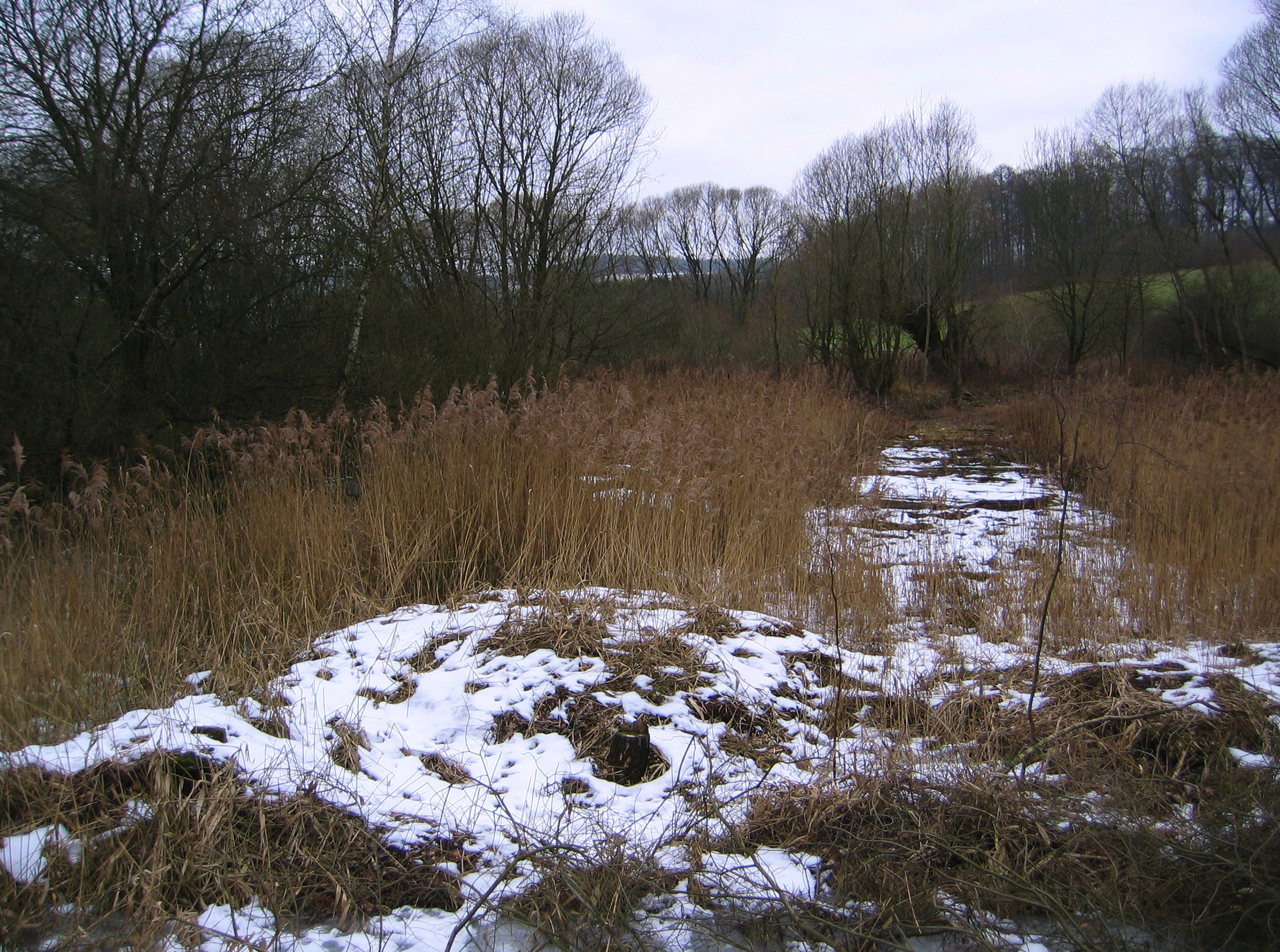 Nasser Bereich – alte Torfabbaufläche mit Schilfbestand (Phragmites australis) und altem (neuzeitlichen) Bohlenweg – im Nordteil des Naturschutzgebiets Satzer Moor, Bad Driburg, Deutschland.